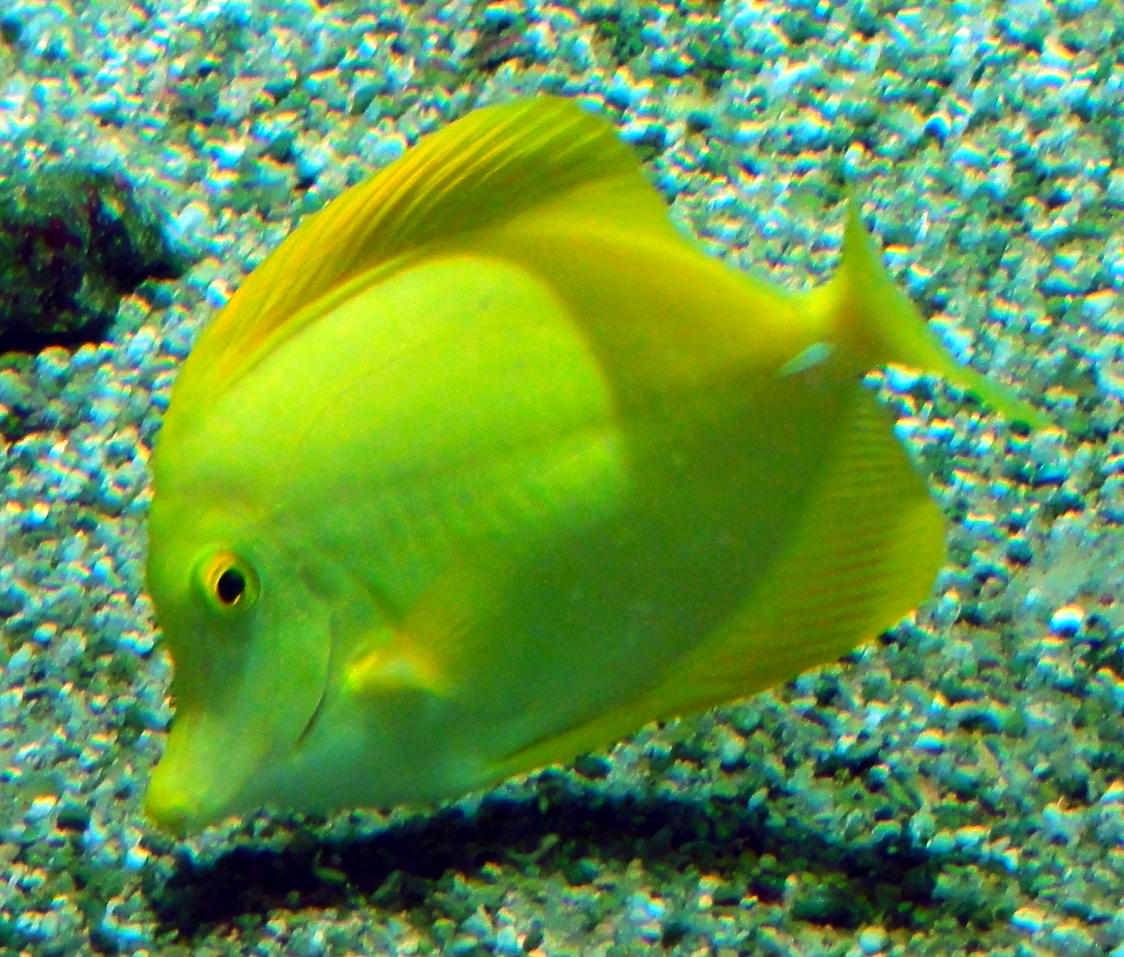 Zebrasoma flavescens